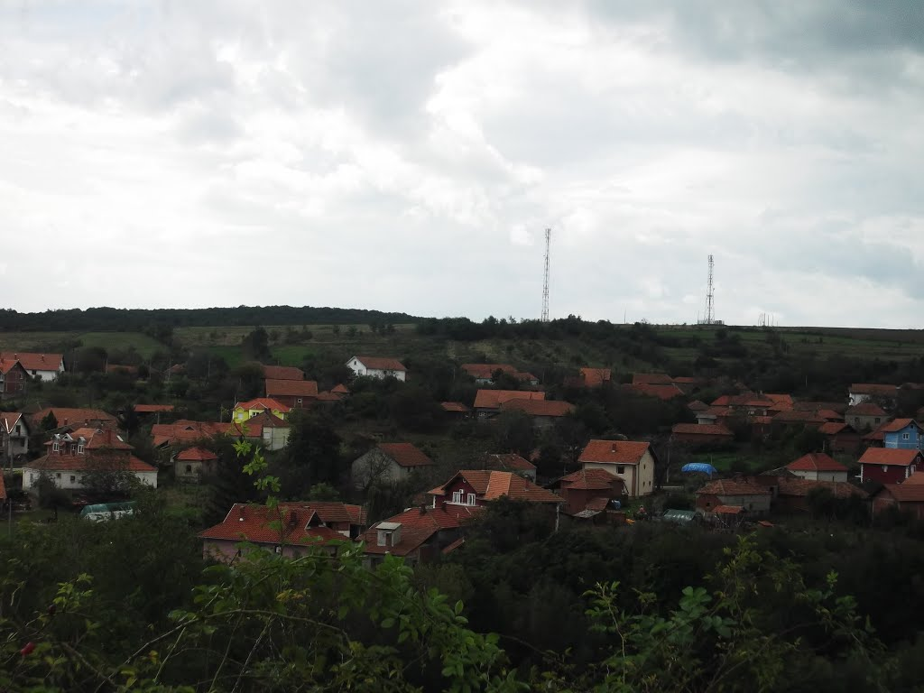 Panorama Мale Jasikove